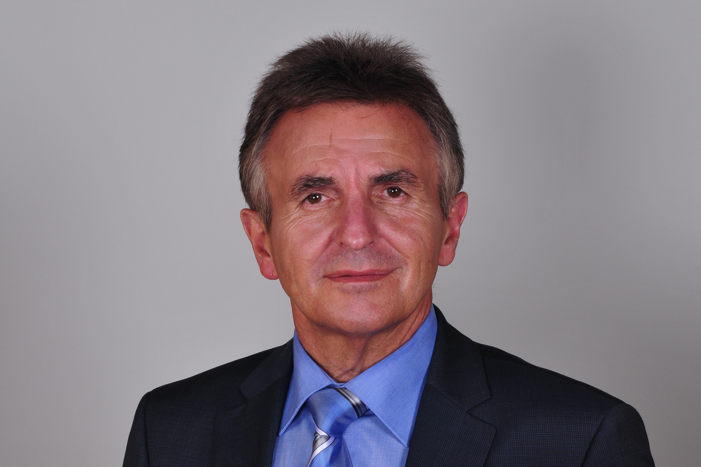 Landtagsprojekt Bayern The making of this document was supported by Wikimedia Austria. Wikipedia im Landtag – Bayern 17. bis 19. Juli 2012 in München Dieses Foto wurde im Rahmen des Projektes „Wikipedia im Landtag“ erstellt.